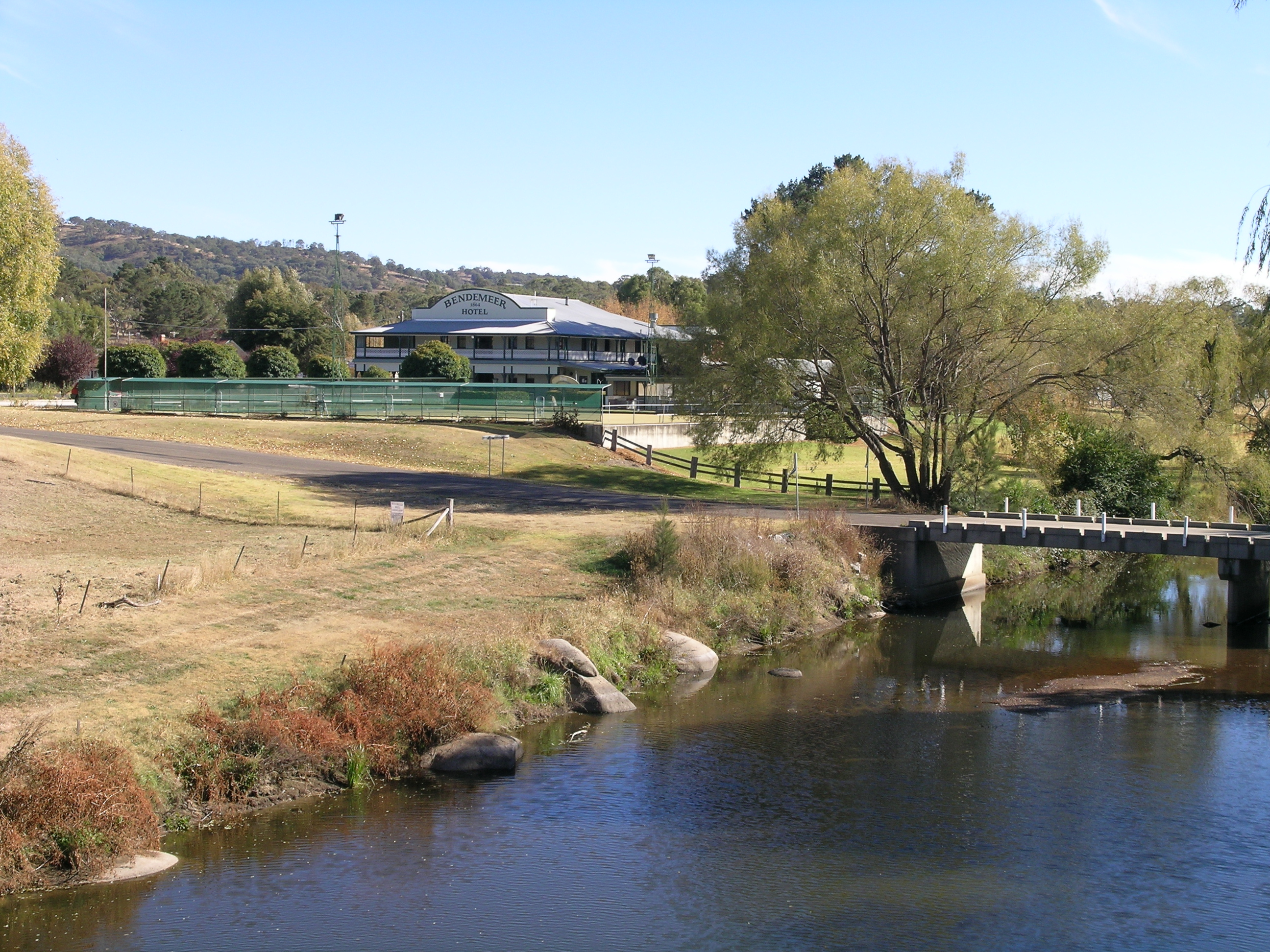 Macdonald River and hotel, Bendemeer, NSW.